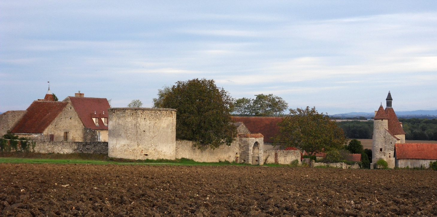 Château d'Artangues (Inscrit) .